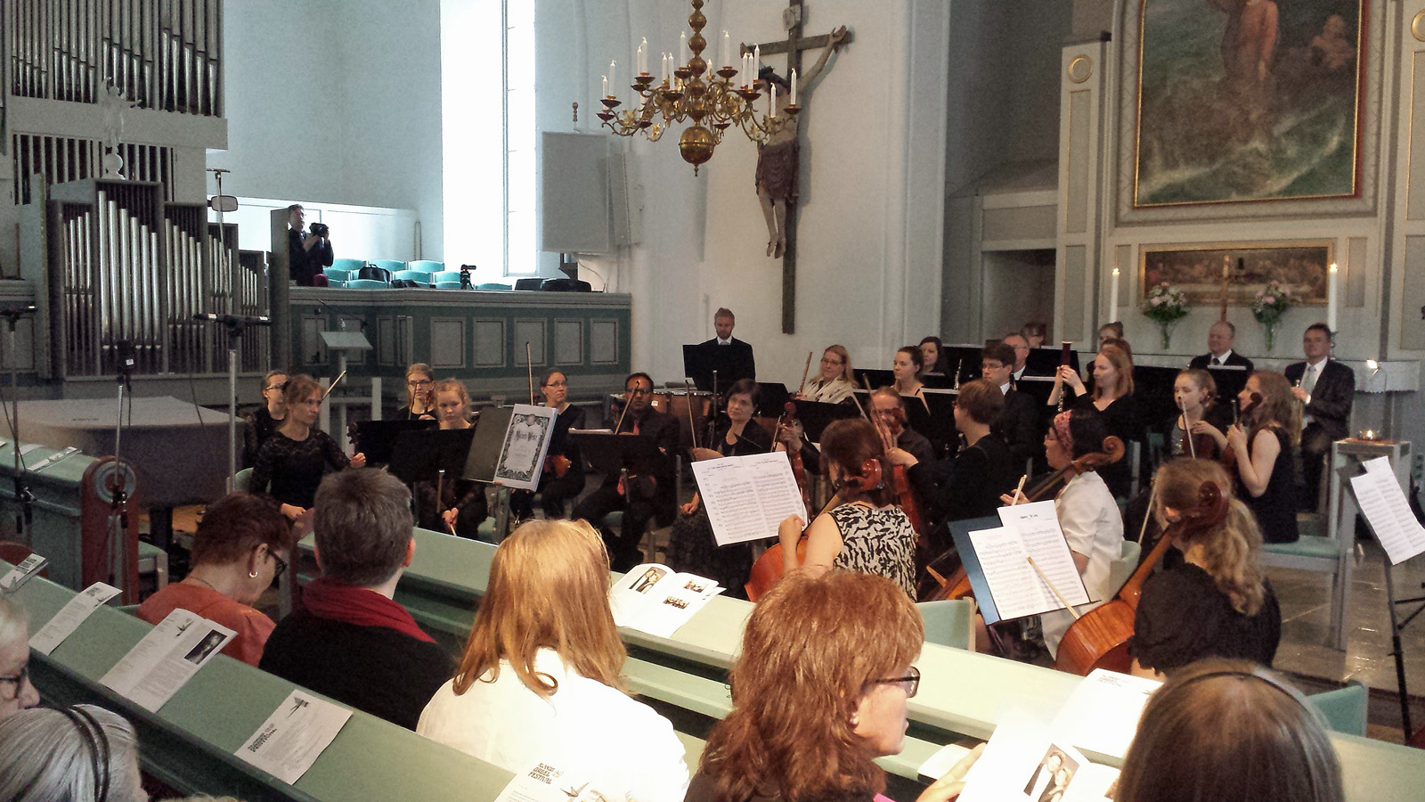 Jubileumskonsert i Jomala kyrka